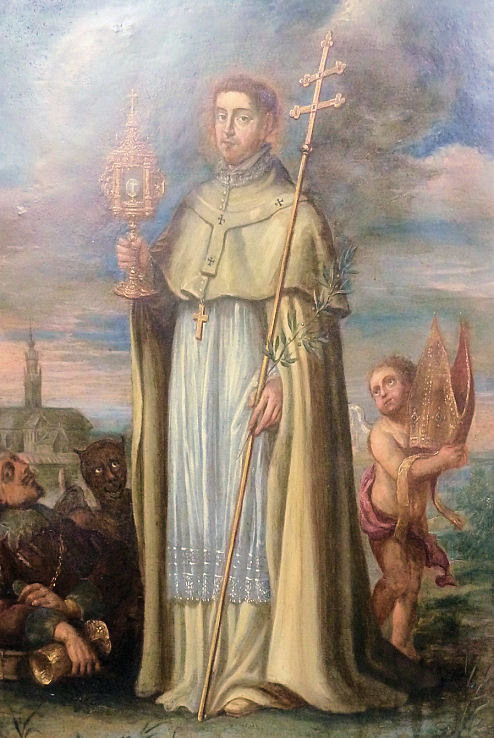 SJACOBVS antw/Datum: 1664 - 1664/H. Norbertus van Prémontré/hoogte: 61 cm breedte: 46 cm/Gaspard de Craeyer